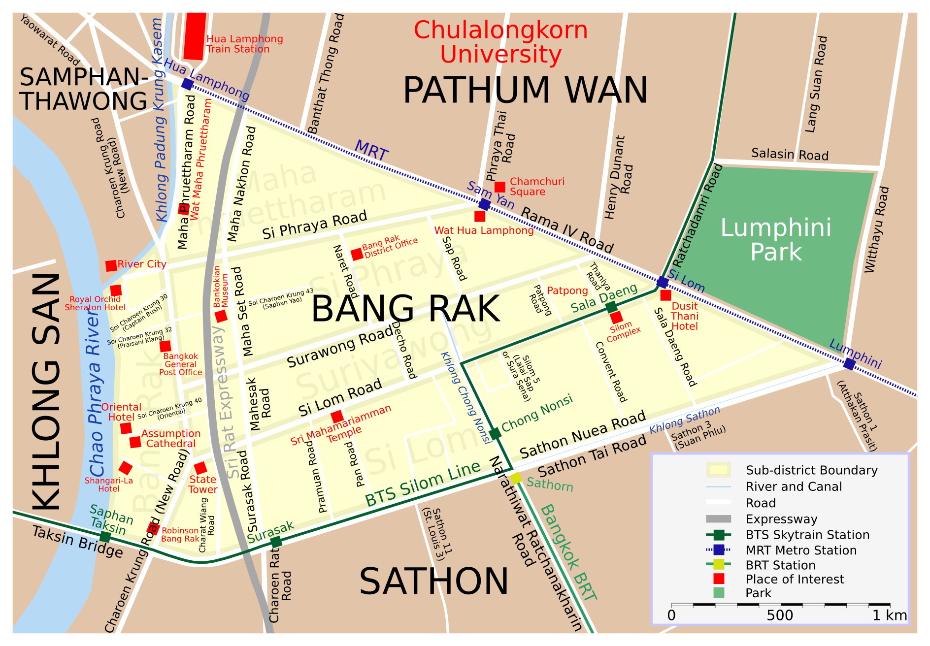 Map of Bang Rak District, Bangkok.